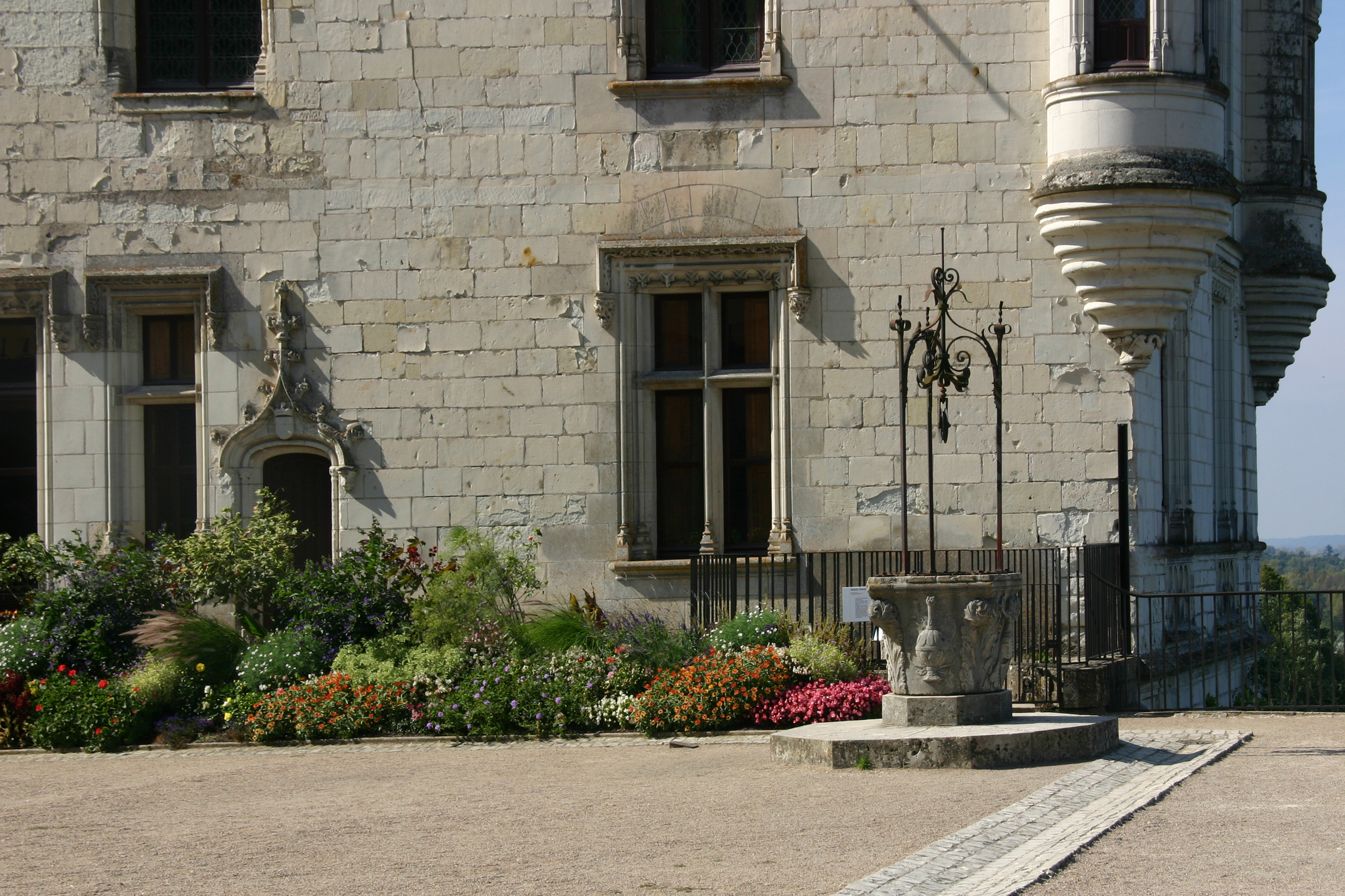 Château de Chaumont-sur-Loire